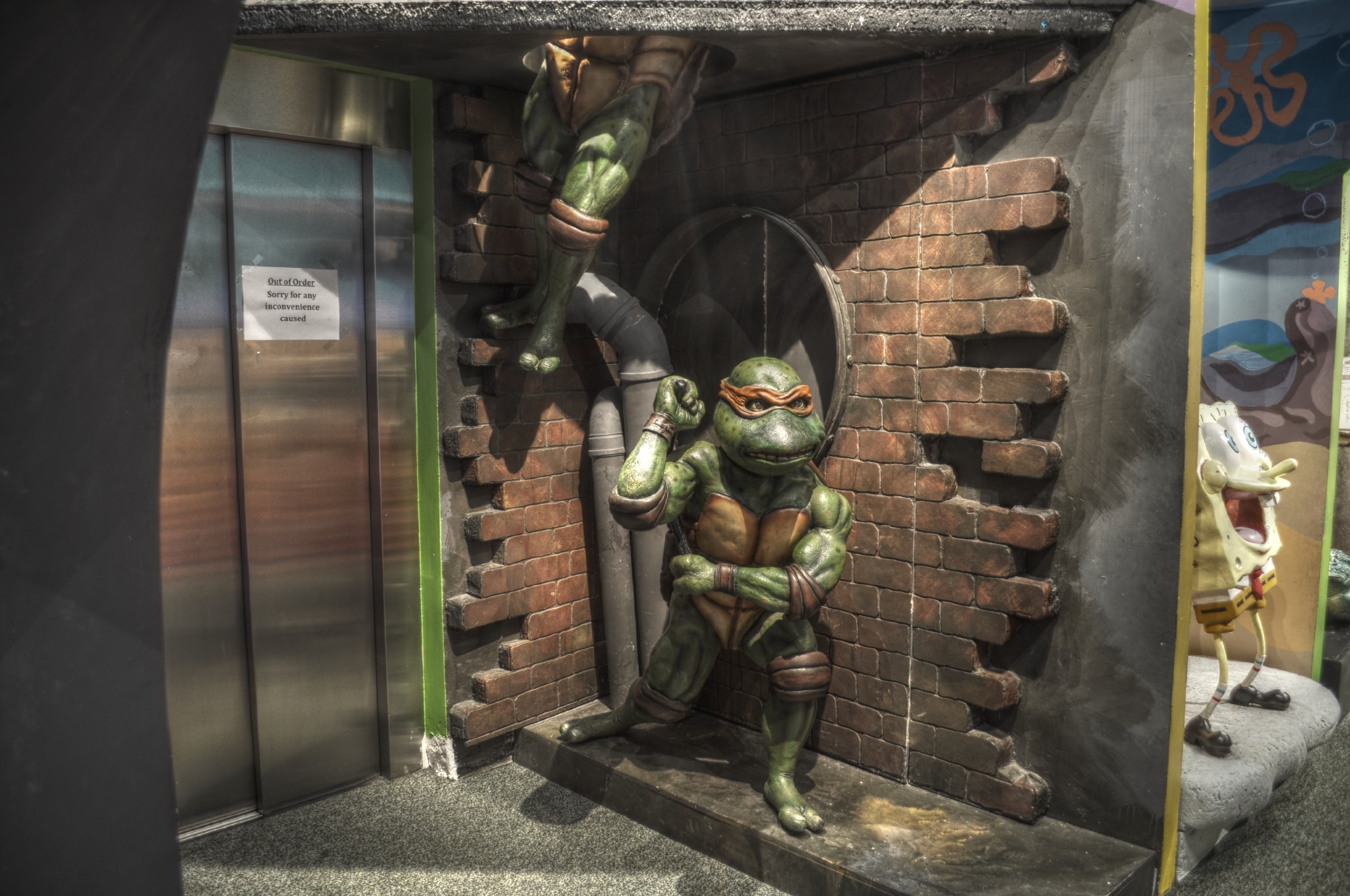 Camera: Nikon D5000 Luminance HDR, Mantiuk '06